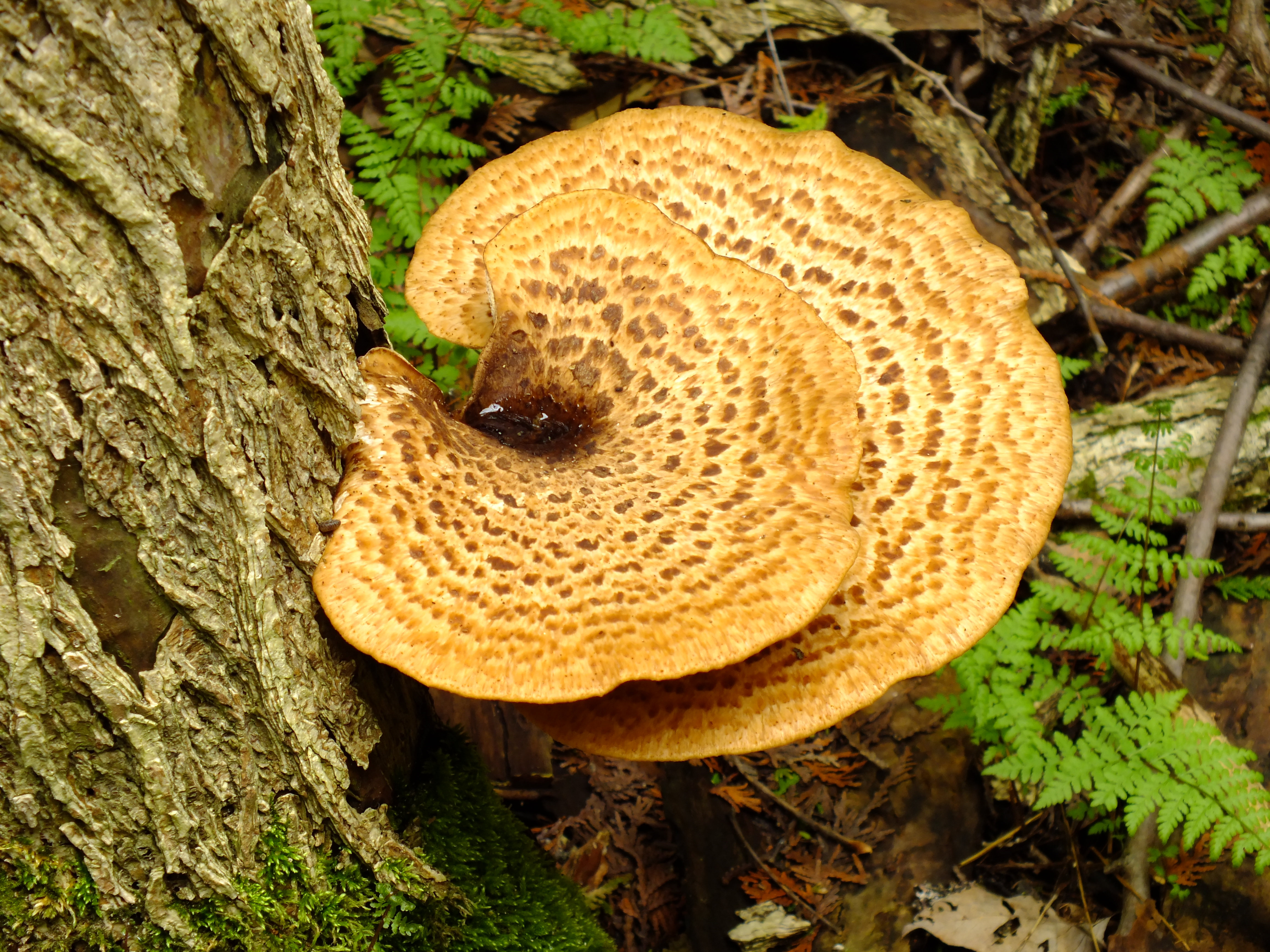 Polyporus squamosus (Huds.) Fr.